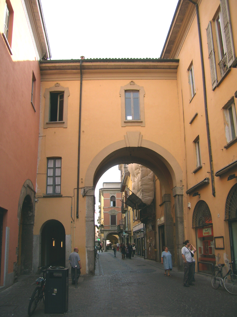 Il cosiddetto "Voltone" in corso Umberto I a Lodi